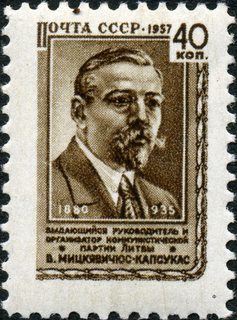 Марка СССР